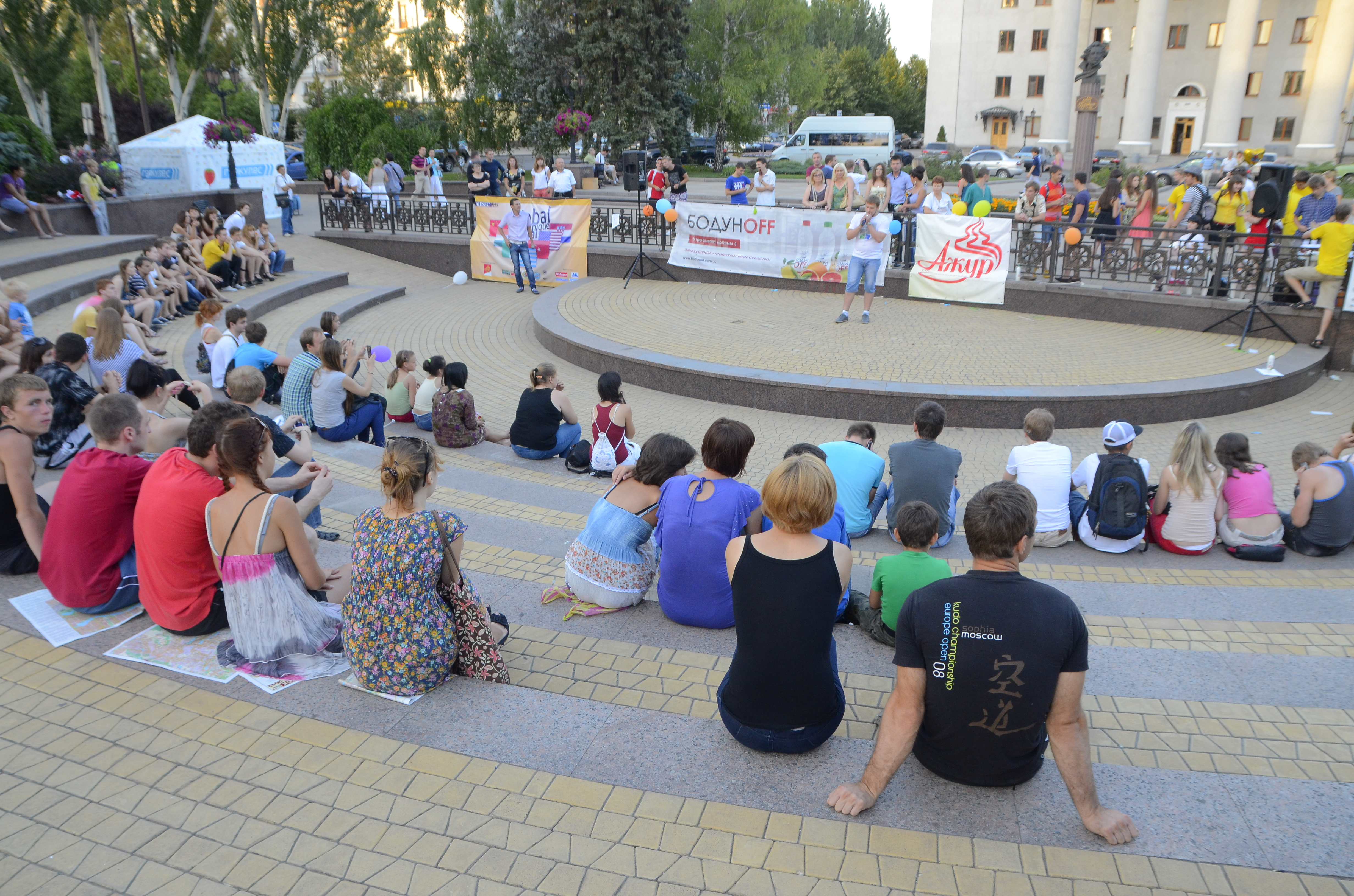 День молодёжи в Донецке